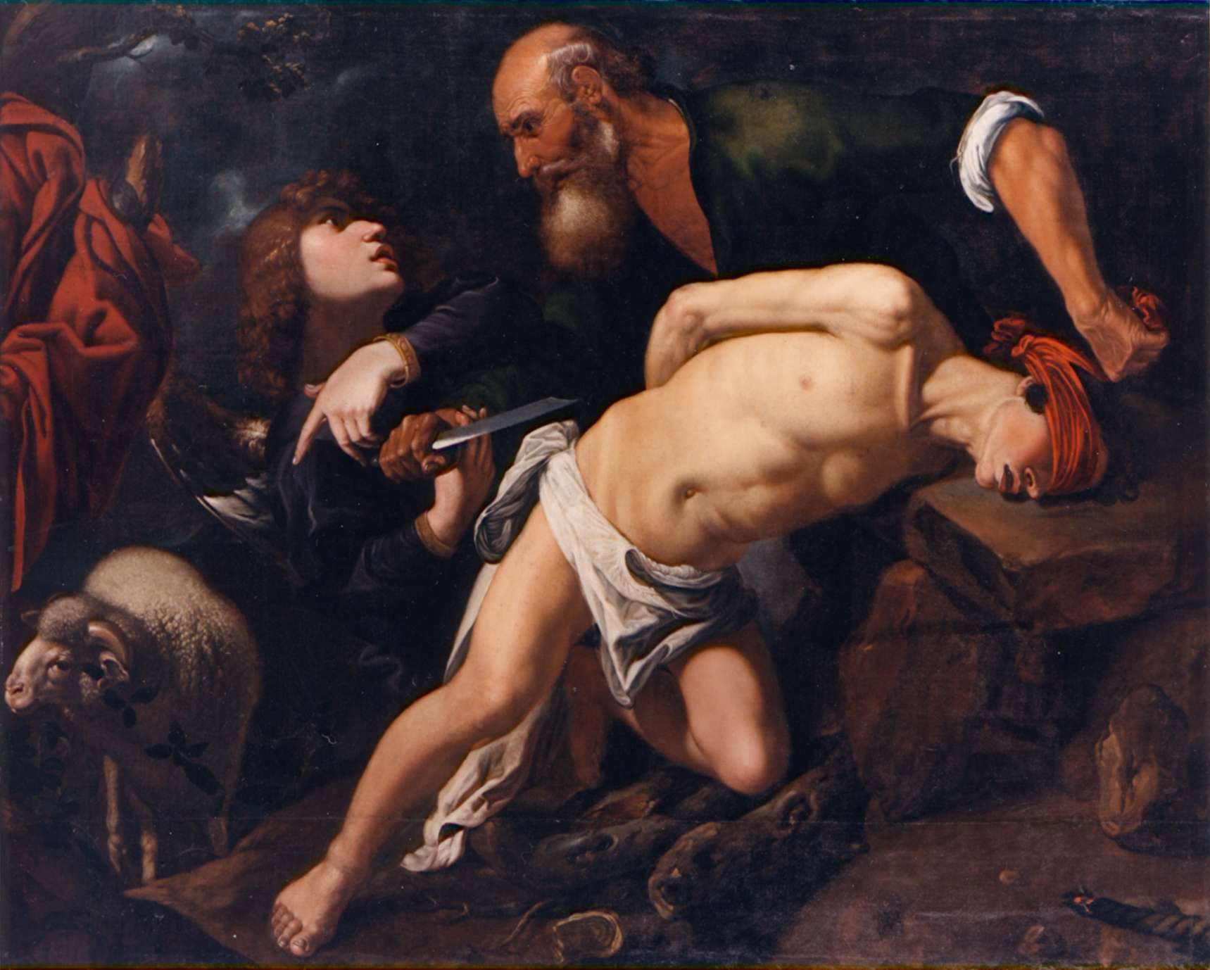 La obra representa al patriarca Abraham disponiéndose a sacrificar, por mandato de Dios, a su hijo Isaac, aunque Yahve, tras comprobar la fidelidad de Abraham a sus mandatos, impidió que el sacrificio se llevara a cabo.